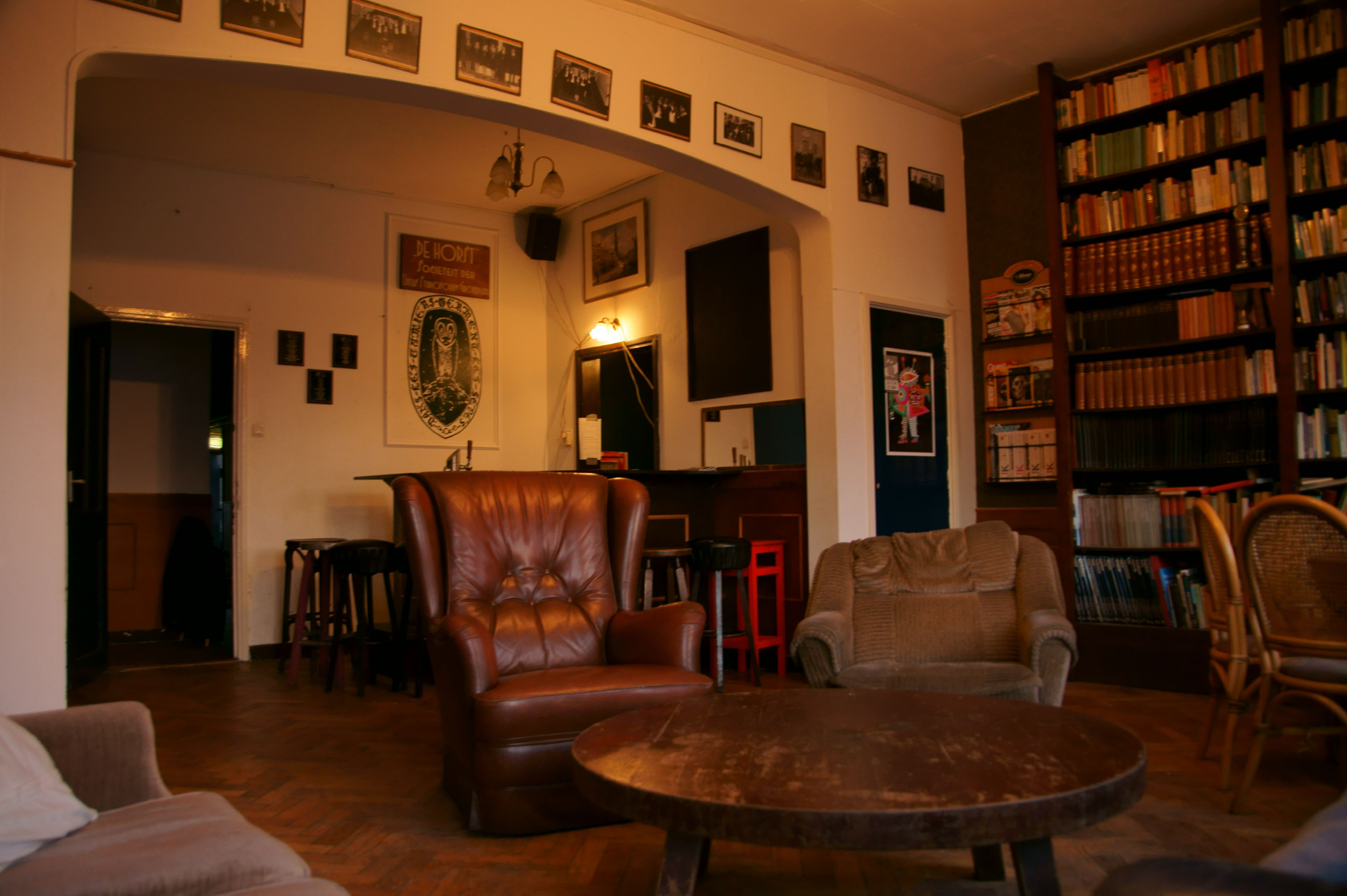 Bibliotheek eerste verdieping Unitas S.G.